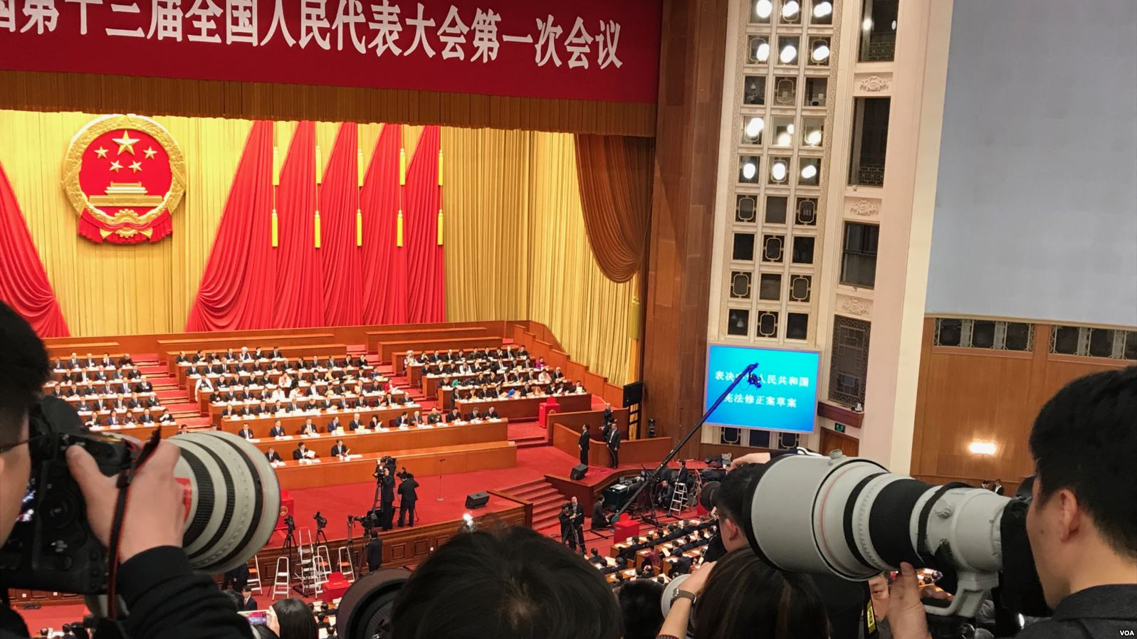 中文（中国大陆）: 2018年3月11日下午，中华人民共和国第十三届全国人民代表大会第一次会议第三次全体会议，近三千位代表投票表决备受关注和网民质疑的修宪案。投票结果毫无悬念，但仍受到国际媒体聚焦。（美国之音叶兵拍摄）